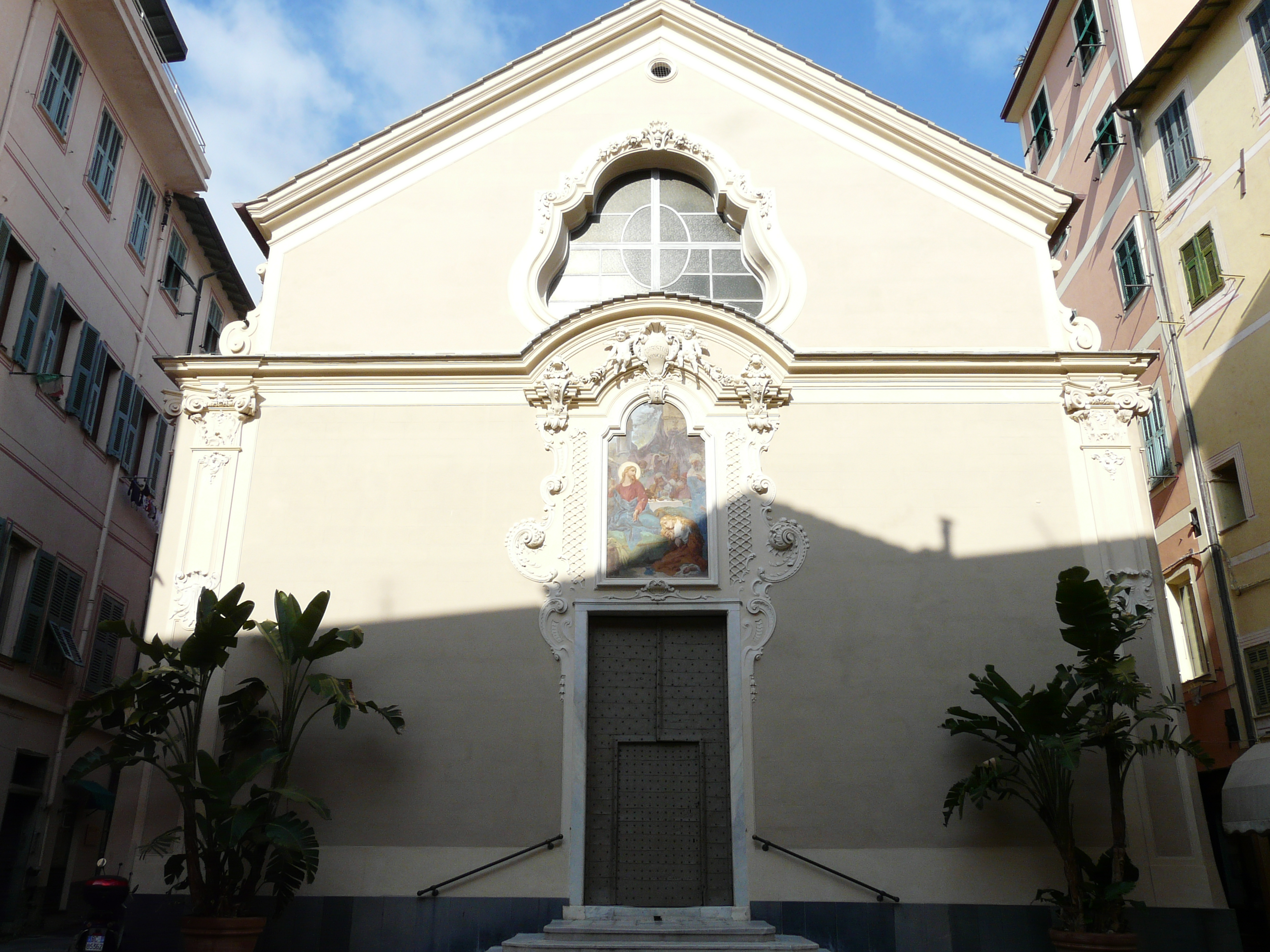 Chiesa di Santa Maria Maddalena di Bordighera, Liguria, Italia